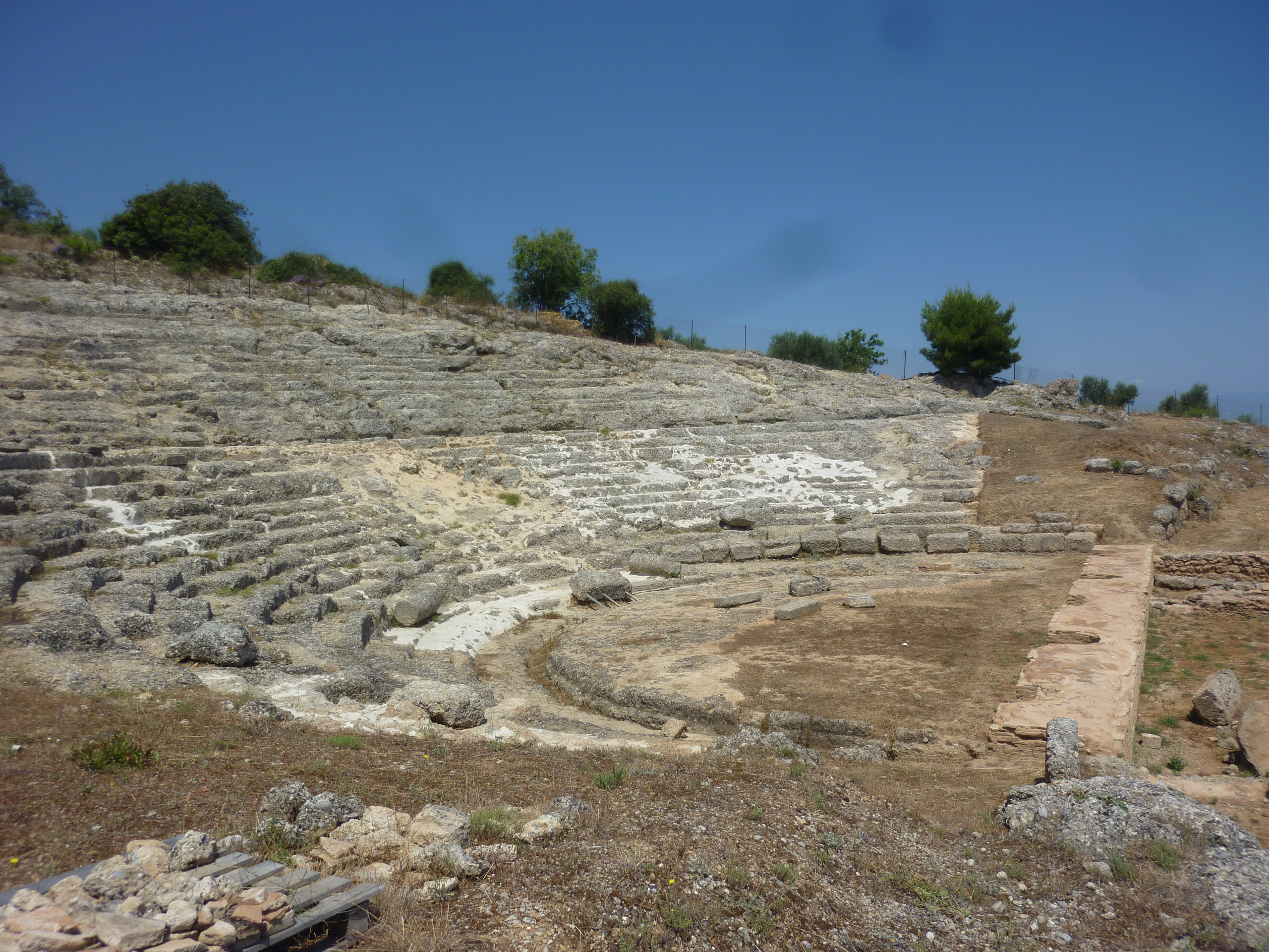 Théâtre antique d'Egira, Grèce